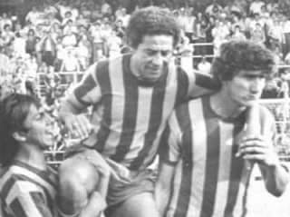 En su último partido con la camiseta de Rosario Central, el uruguayo José Jorge González es llevado en andas por sus compañeros Jorge García y Edgardo Bauza, tras disputar un encuentro versus Independiente. González es el jugador que mayor cantidad de partidos jugó en el cuadro rosarino.